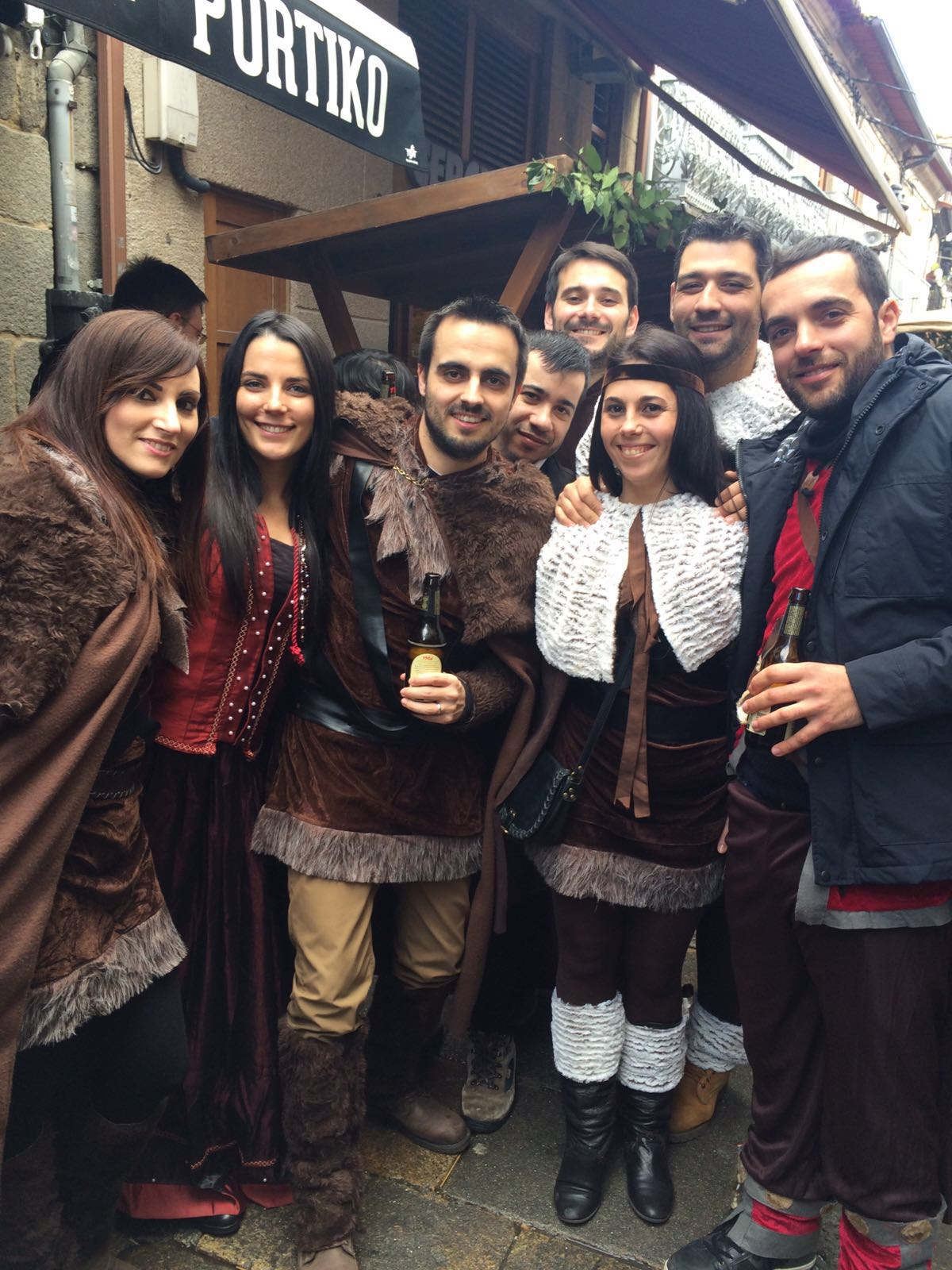 Visitantes vestidos con ropa de época